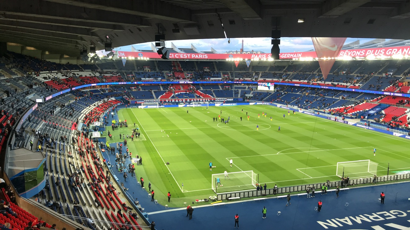 PSG-Nantes Ligue 1 le 03-04-2019